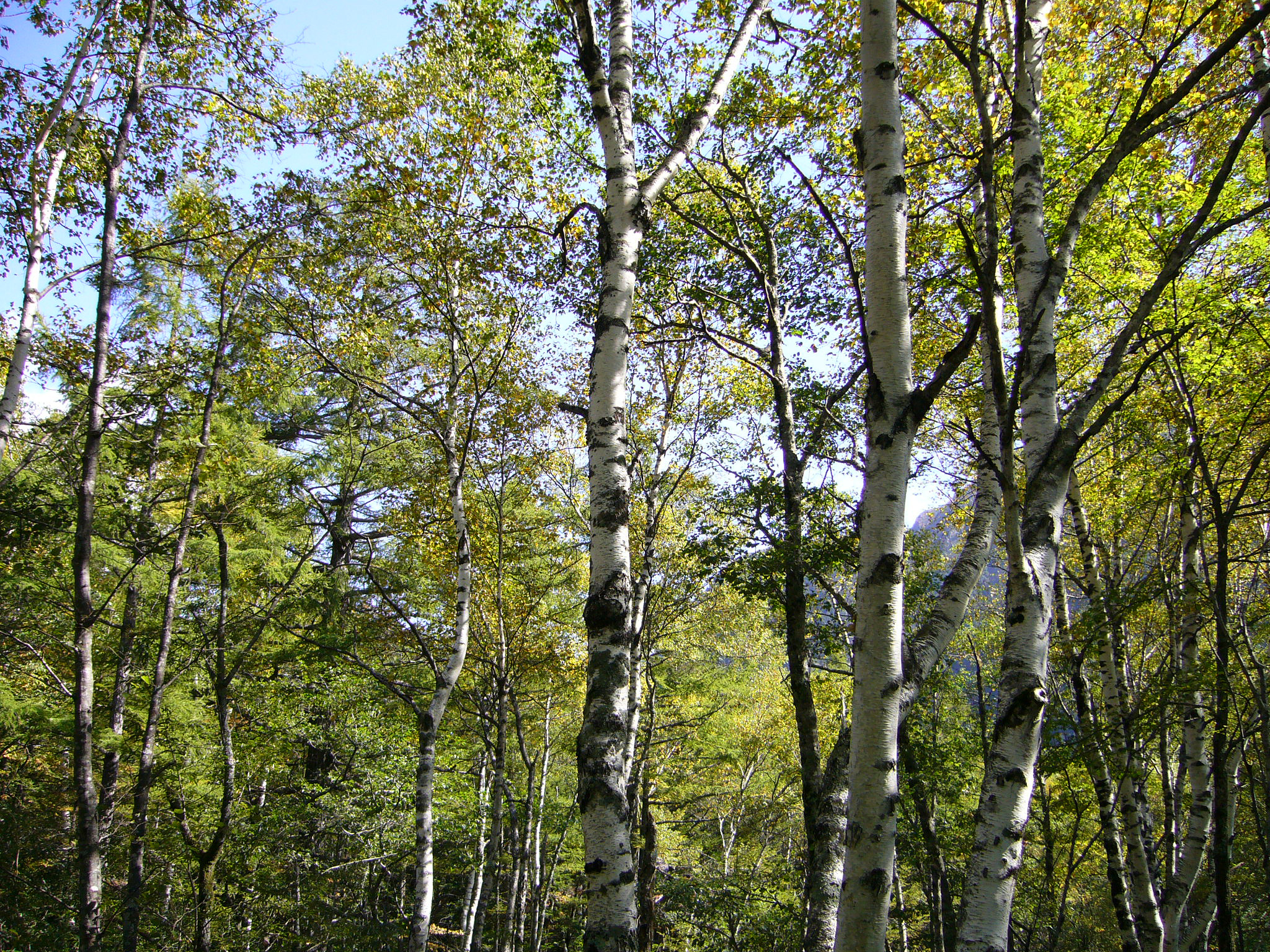 Kamikochi, Matsumoto, Nagano